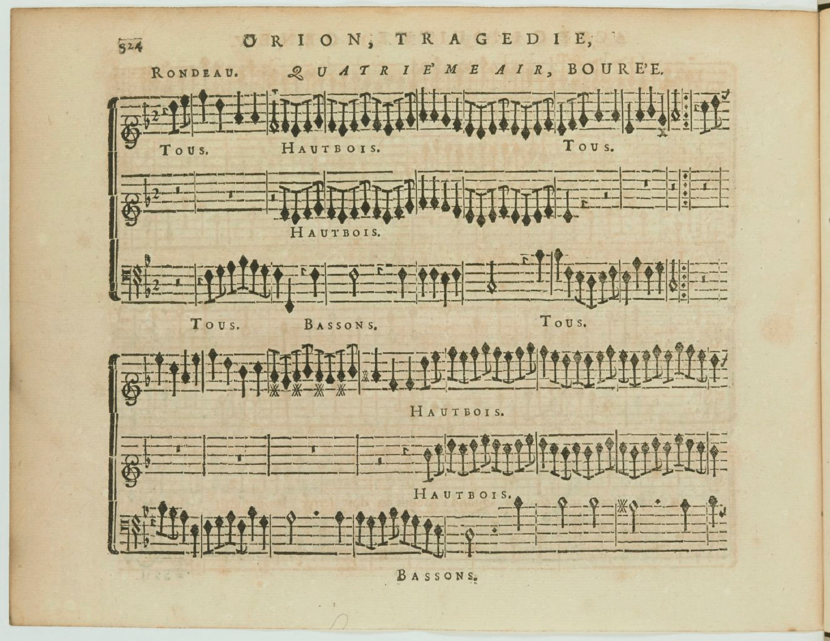 Bourré 0 Orion